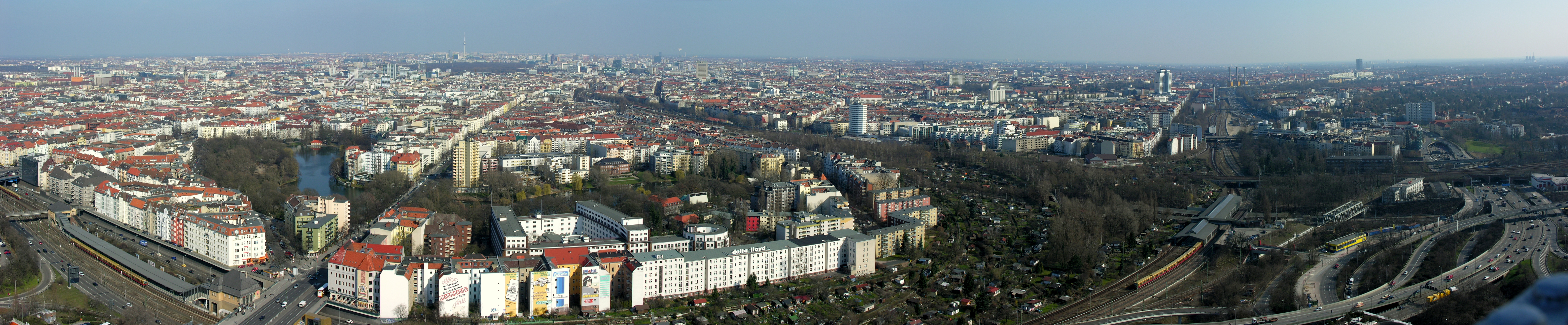 Germany, Berlin, View from Berlin Funkturn